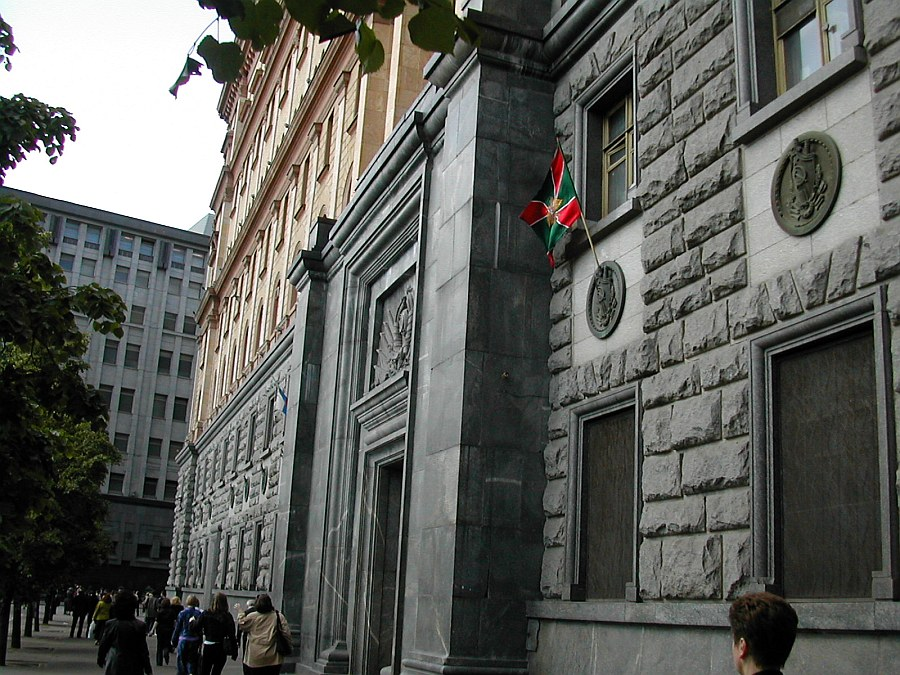 Łubianka - siedziba FSB w Moskwie - główne wejście. 30 maja 2003 r.